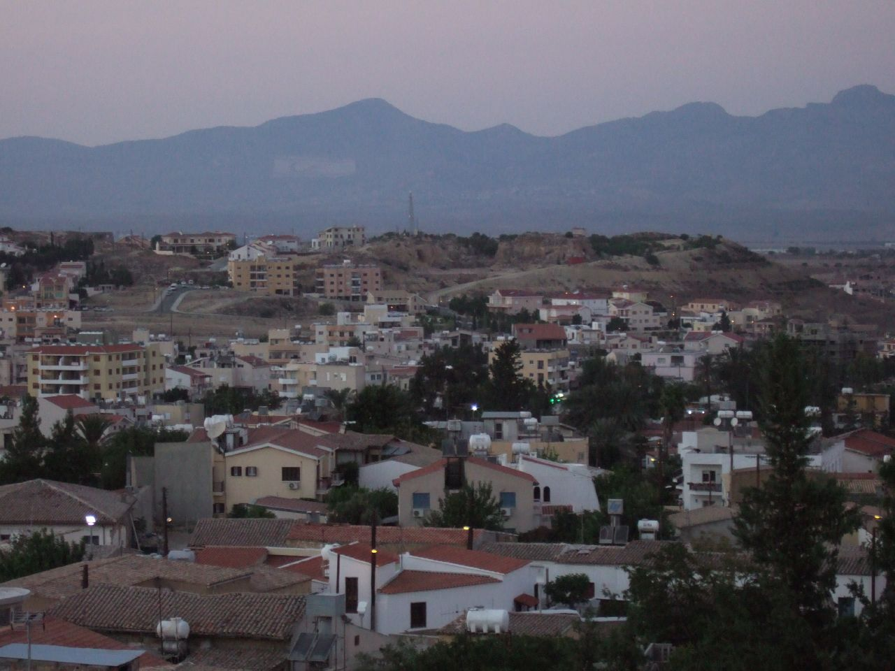 Nicosia, CiproDivided city